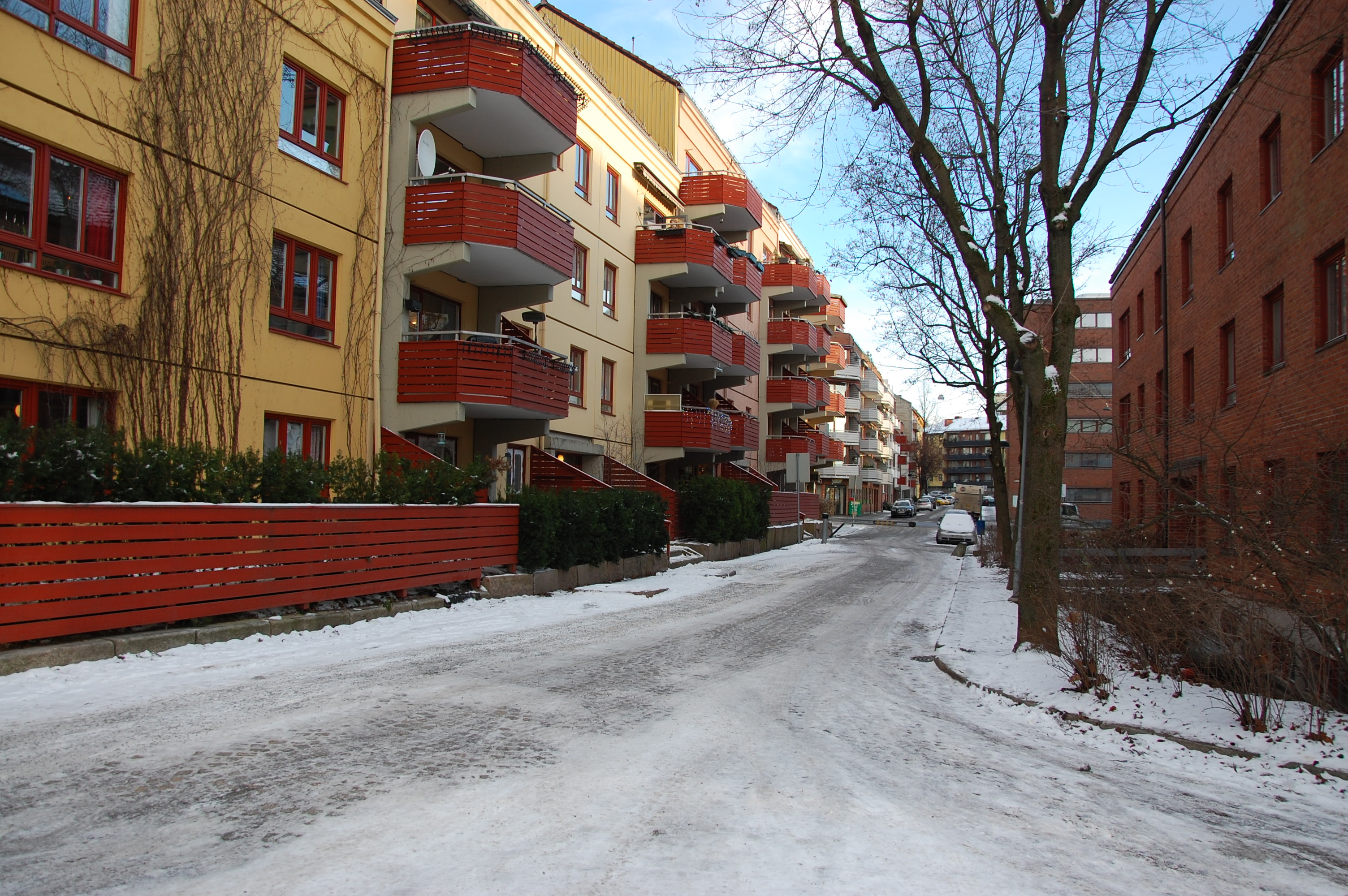 Larviksgata på Bjølsen i Oslo sett fra Bjølsengata mot Bergensgata.